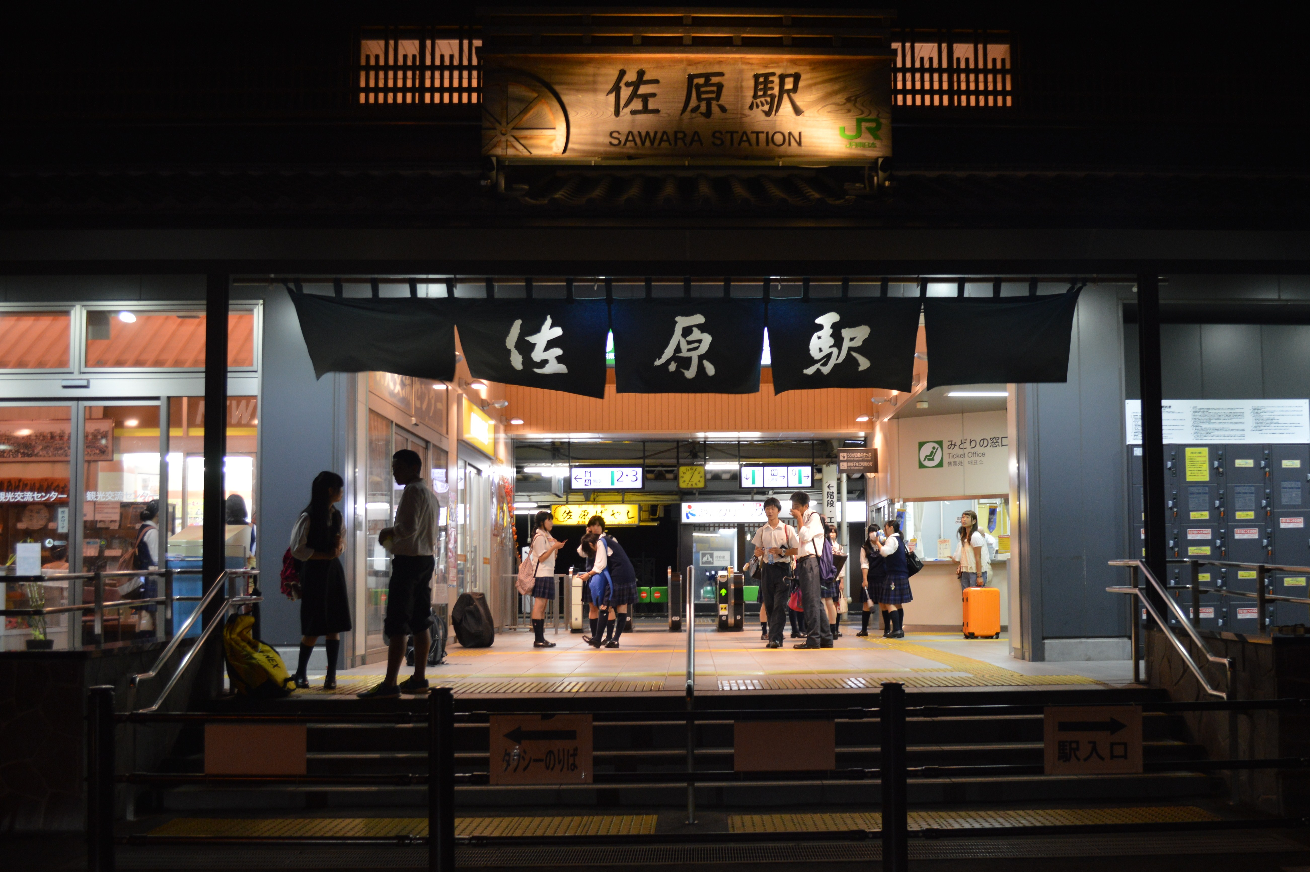 千葉県香取市の佐原駅